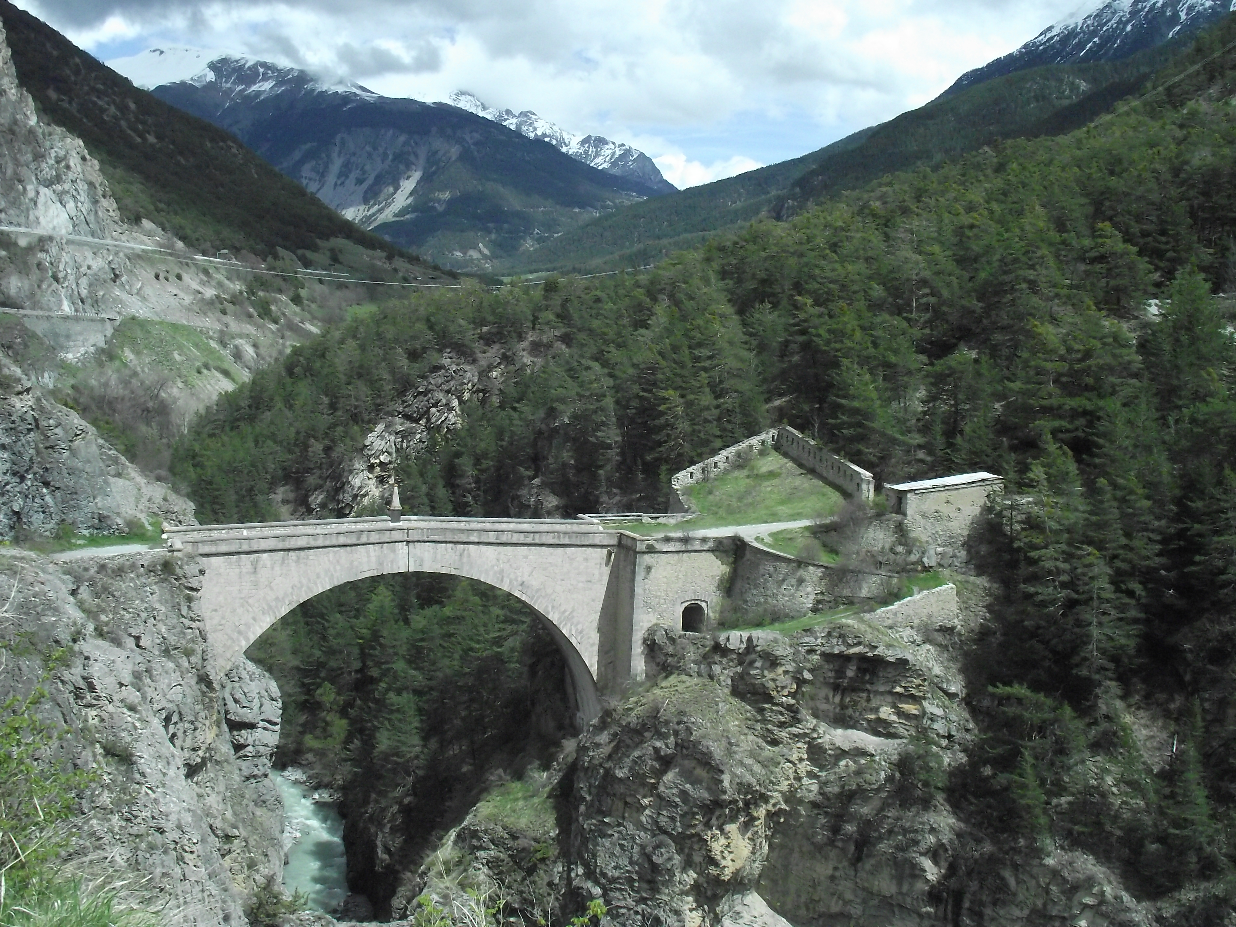 Fort du Chateau